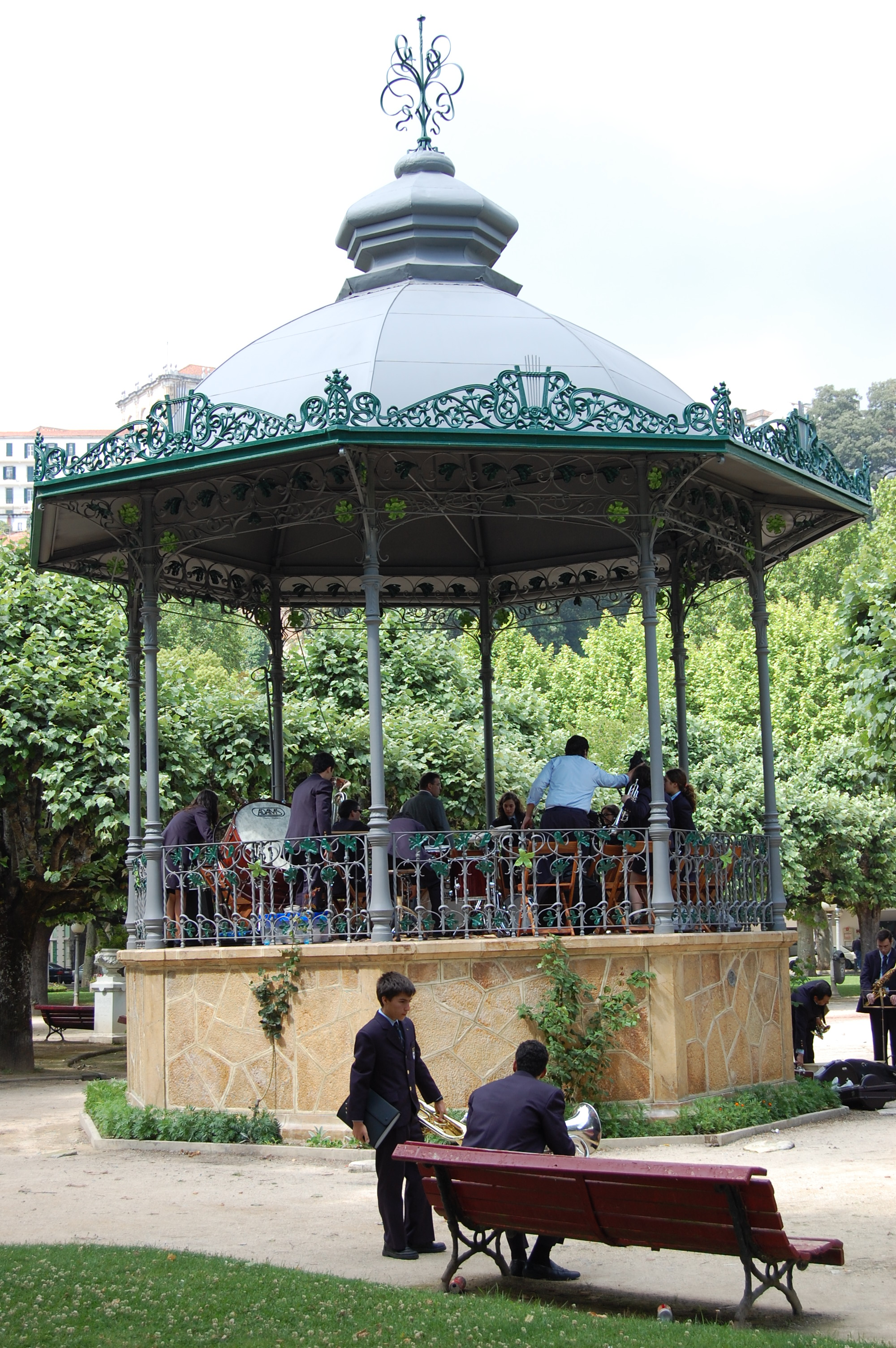 Bandstand - Coimbra - Portugal